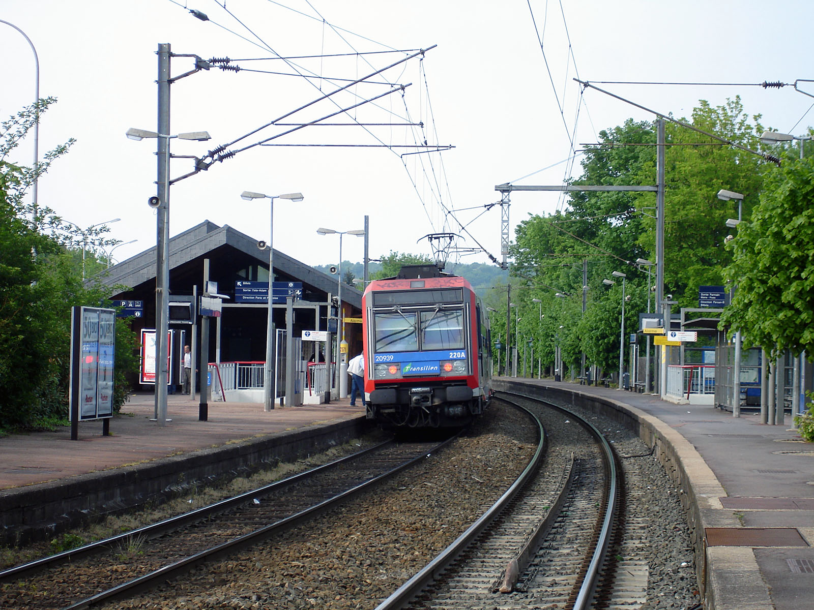 La gare de L'Isle-Adam - Parmain, Val-d'Oise, France.